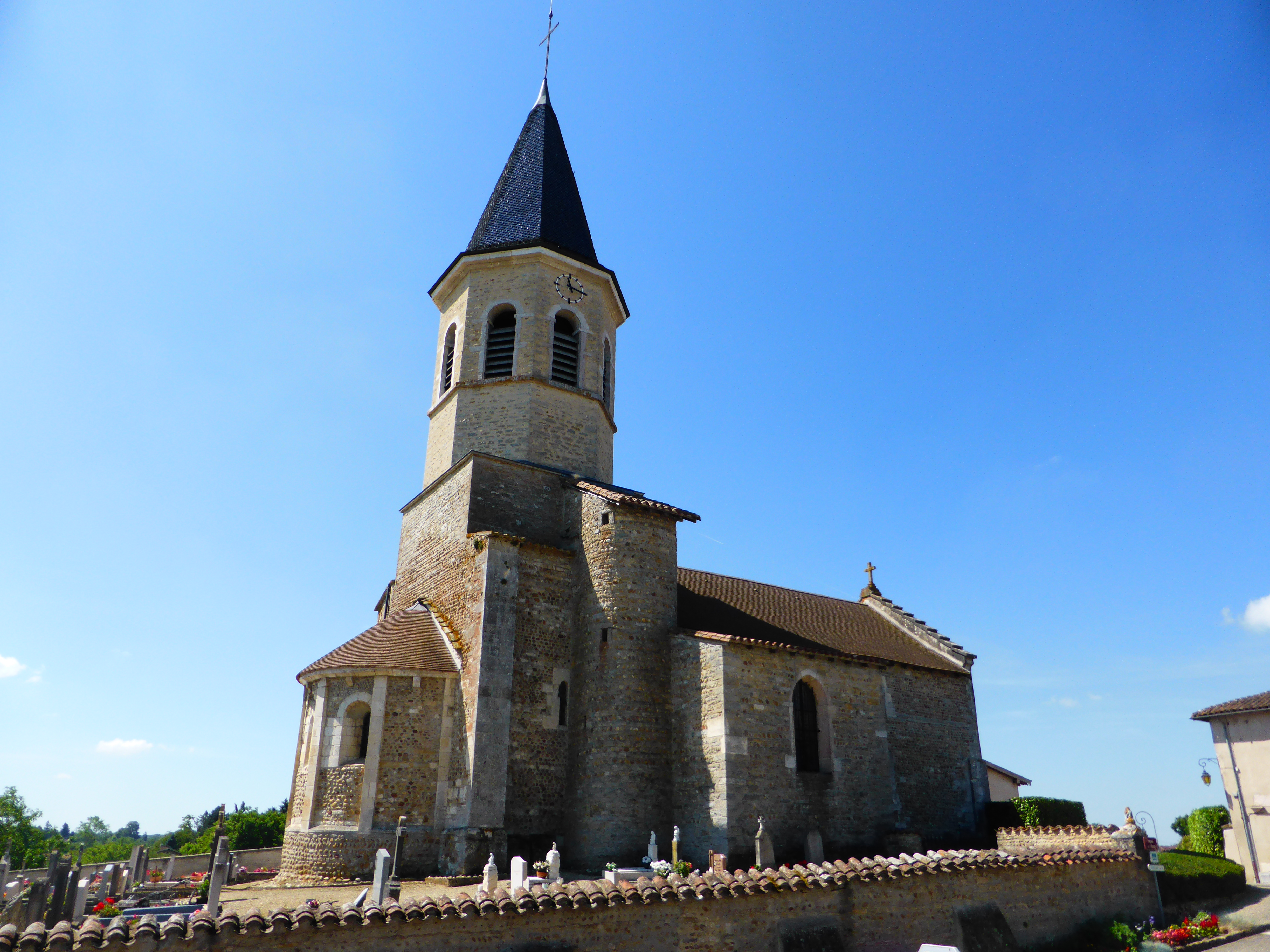 Église Saint-Rémy de Saint-Rémy dans l'Ain.